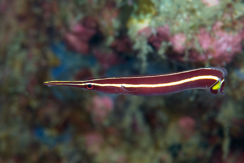 Diademichthys lineatus en Koh Phangan, Tailandia